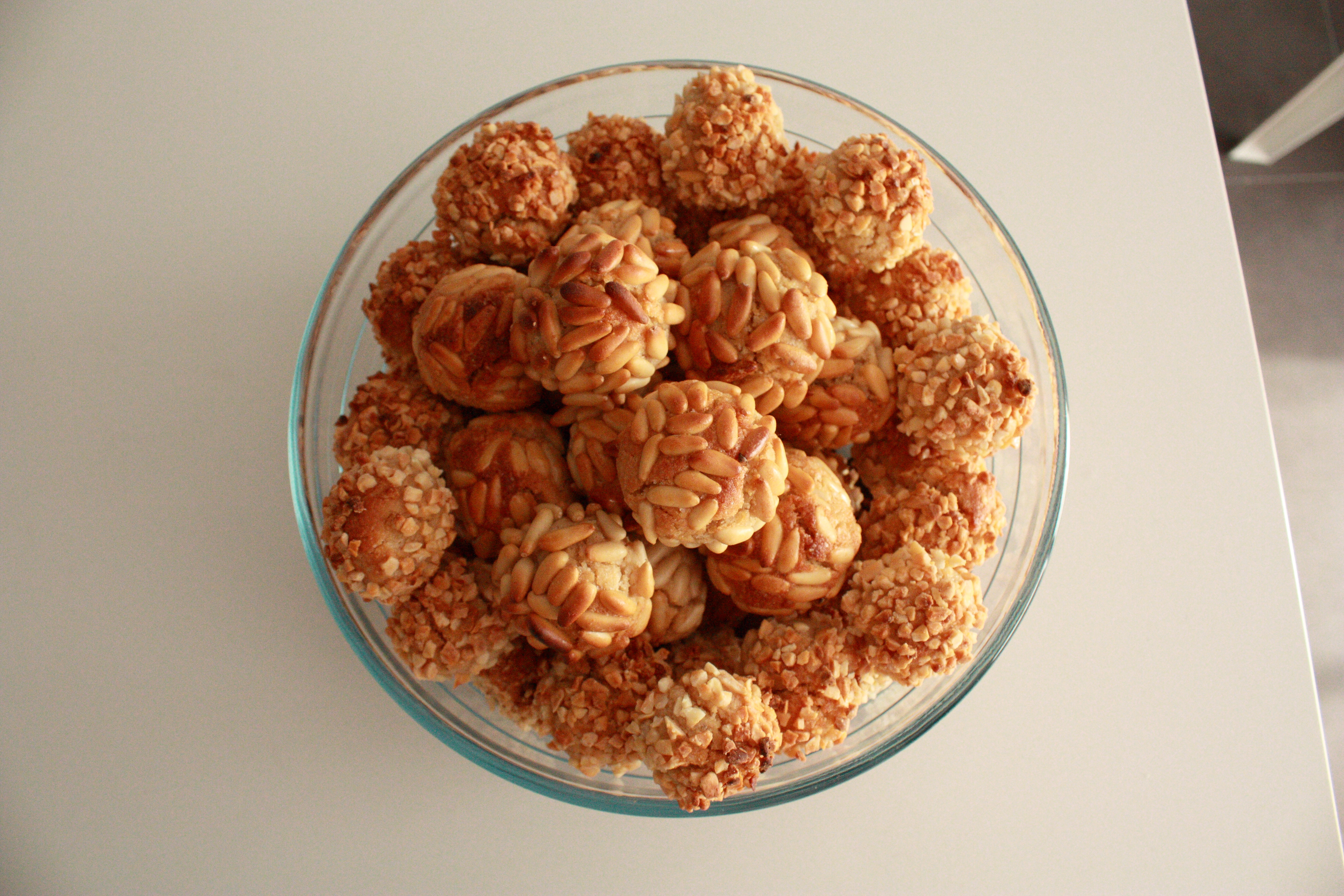 Panellets